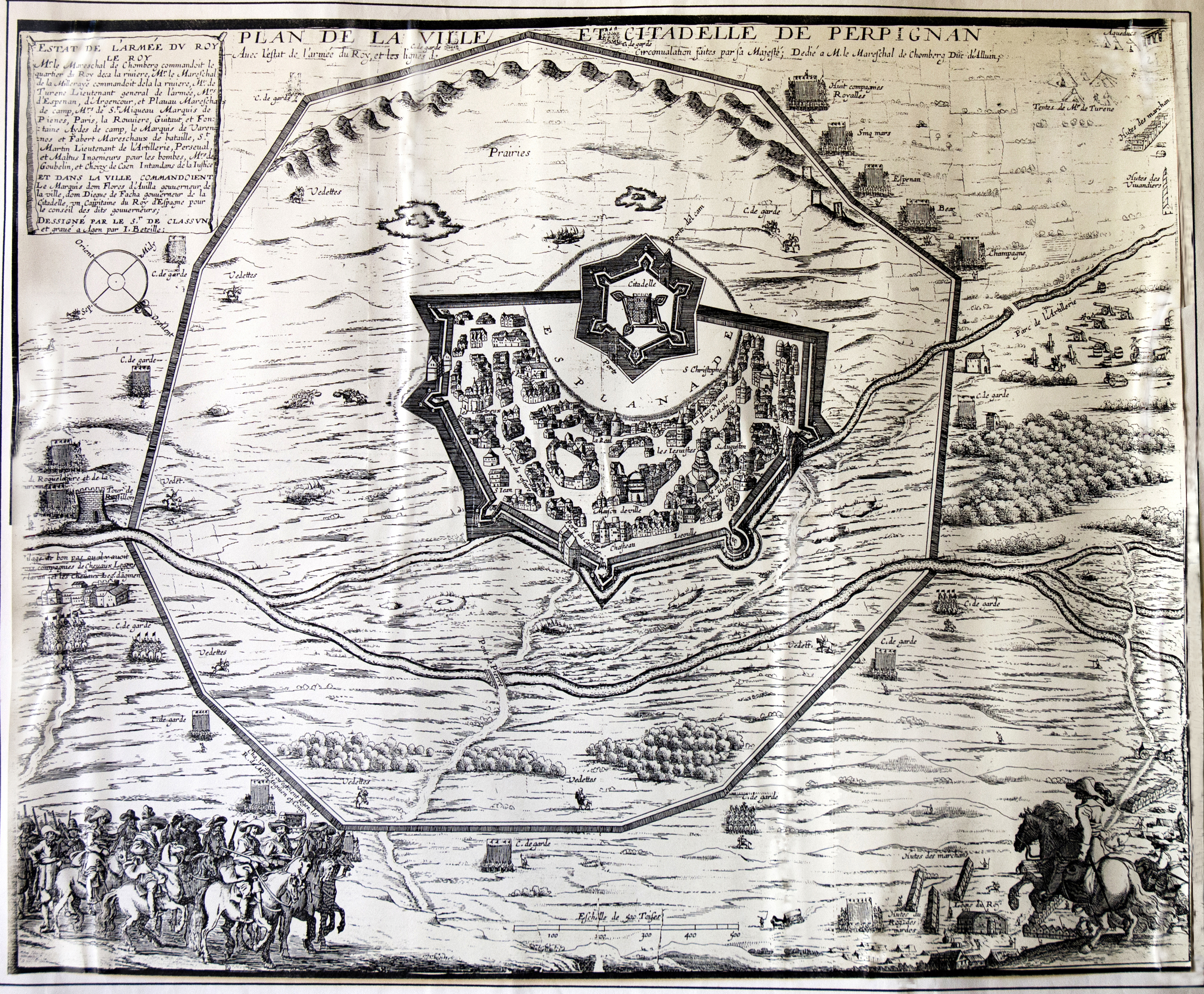 Plànol de Perpinyà. Segle XVII. Gravat fantasiós on es representa la casa del Temple de planta rodona (evident influència del Temple de París). Al seu peu hi diu "Temple du Chevaliers de Melthe".